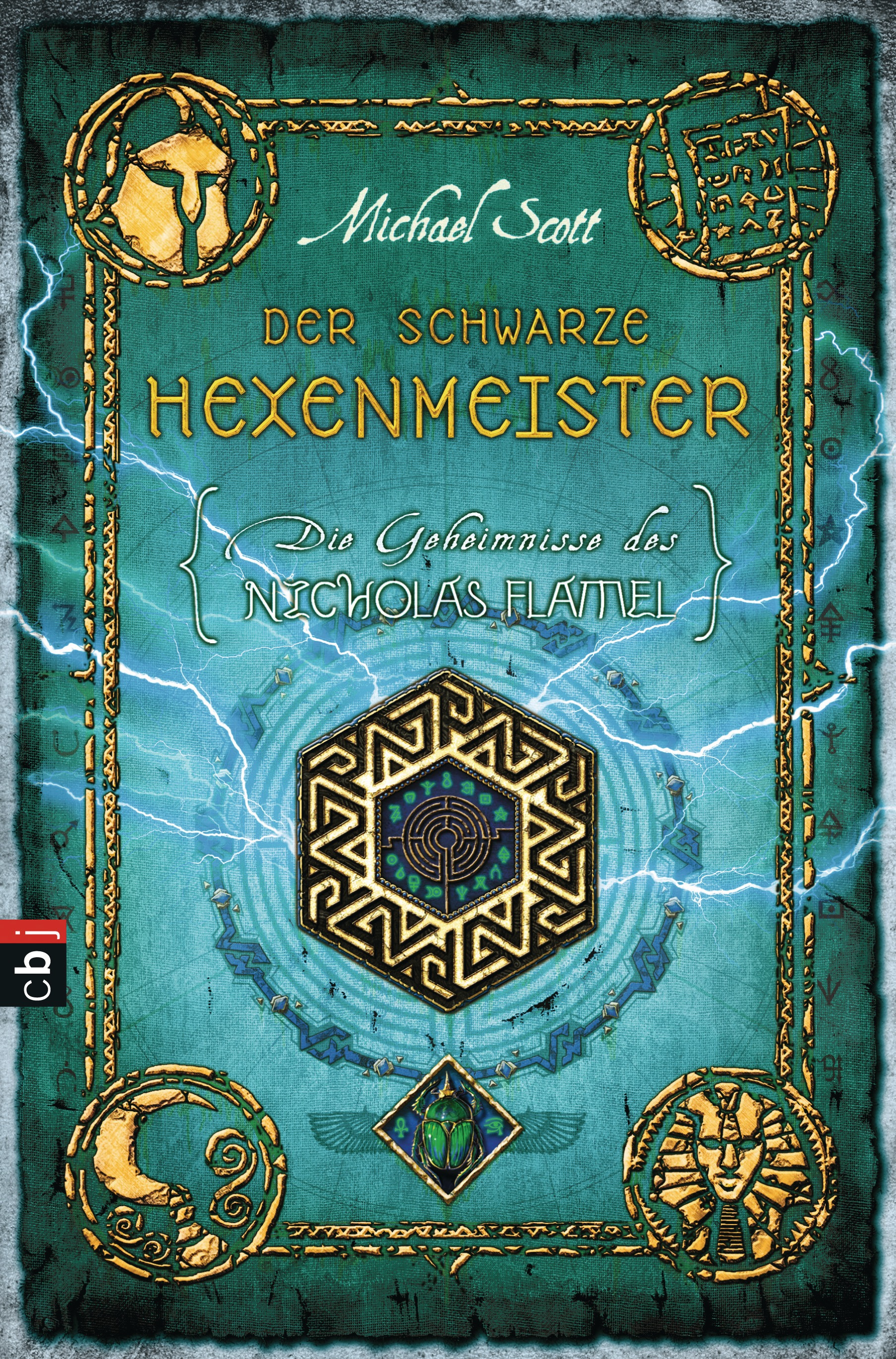 Michael Scott: Die Geheimnisse des Nicholas Flamel. Der schwarze Hexenmeister. cbj, München 2012. DNB